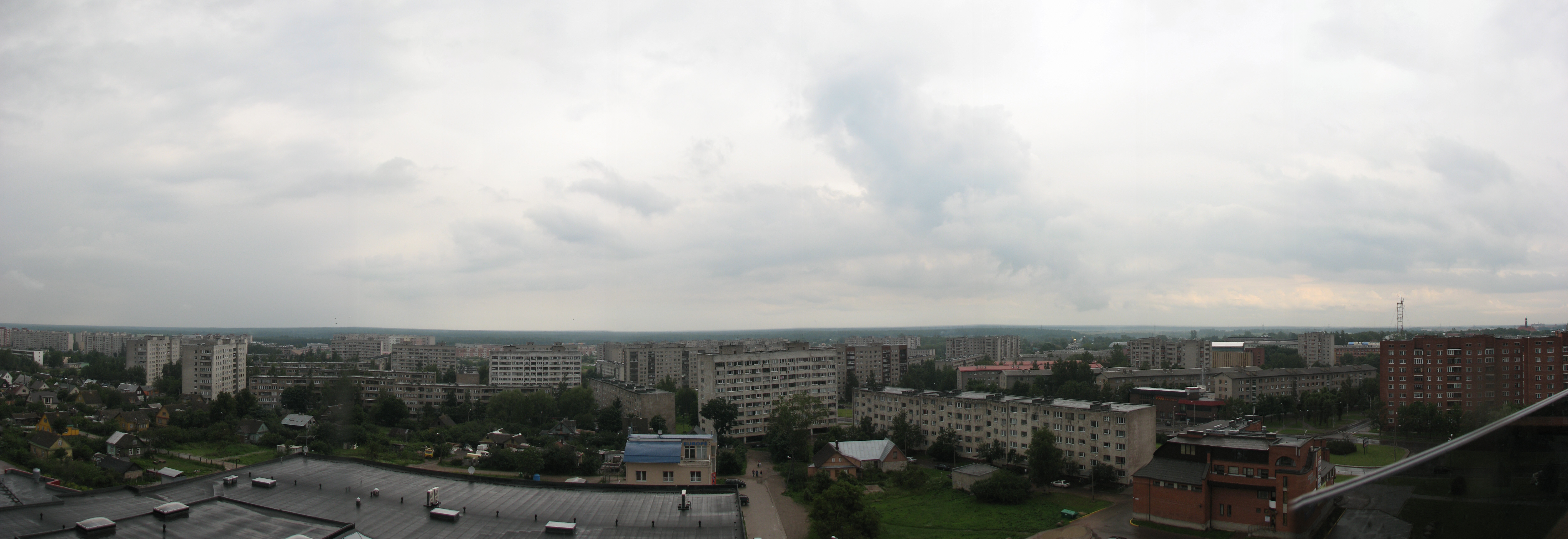 Panorama of Narva, Estonia. Year 2008